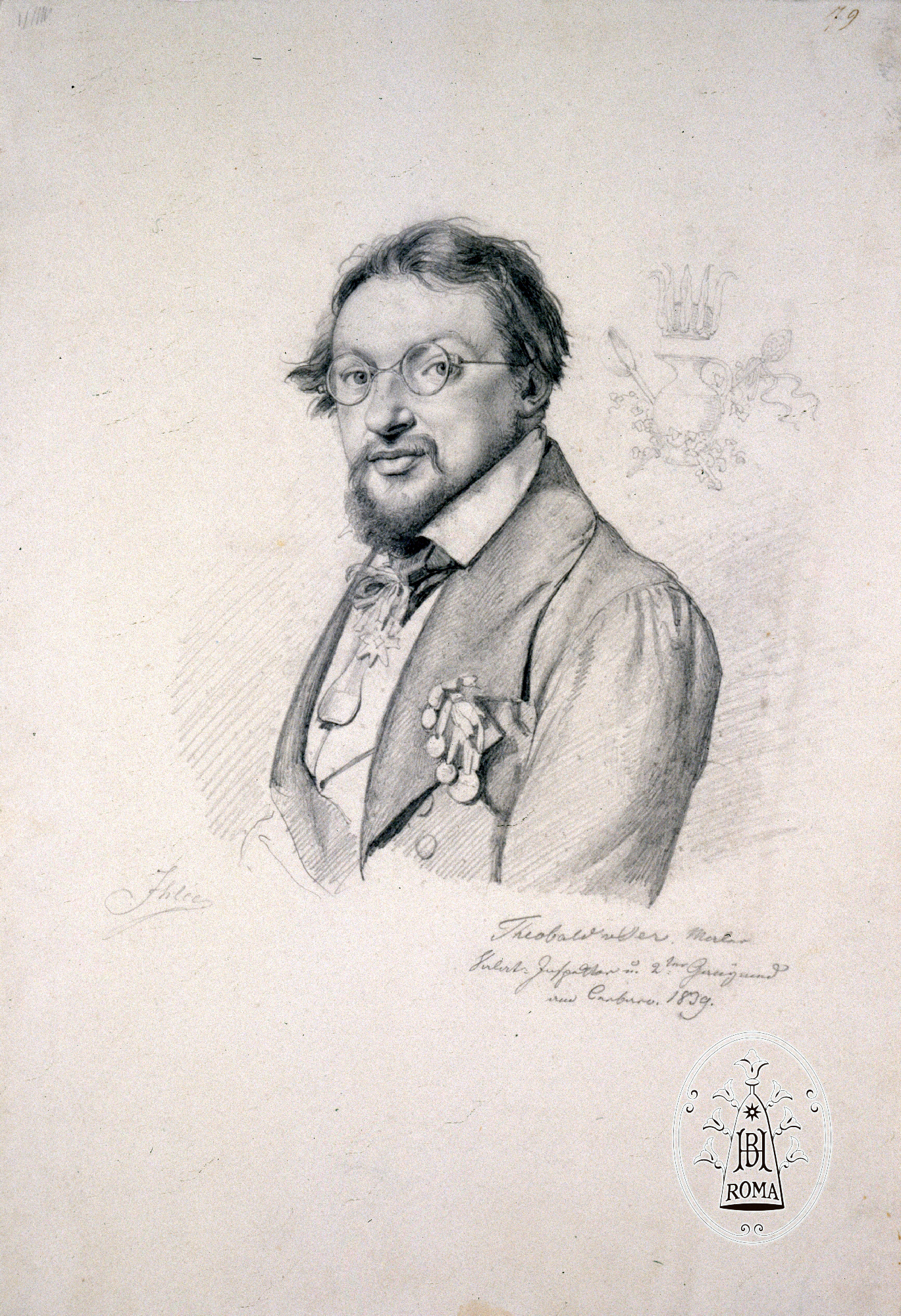 Porträt Theobald Reinhold Freiherr von Oer, gezeichnet von Eduard Ihlée, Rom Cervaro-Fest 1839